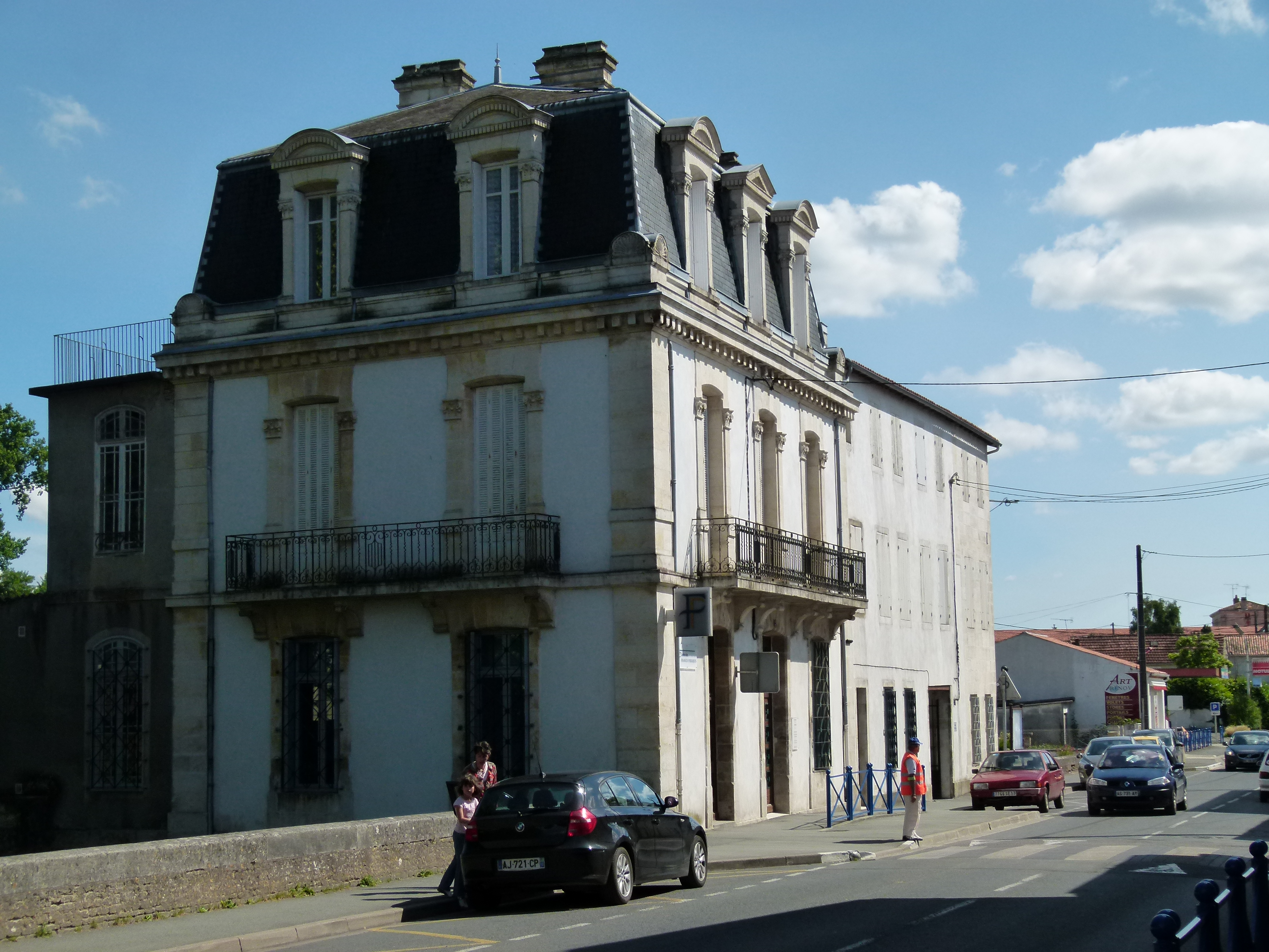 Le Trésor public de Surgères est situé sur l'avenue du faubourg Saint-Pierre.